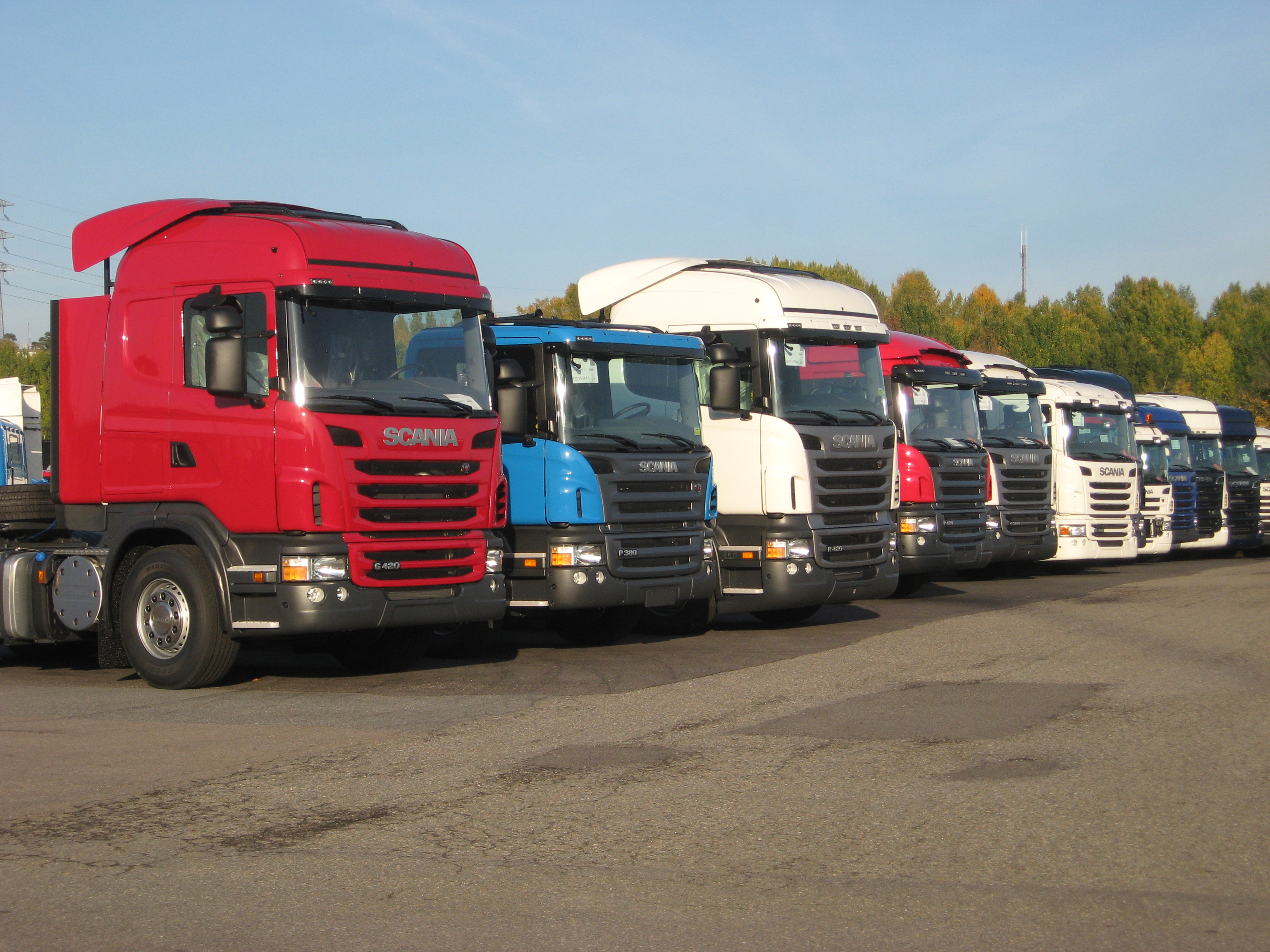 Scania trucks